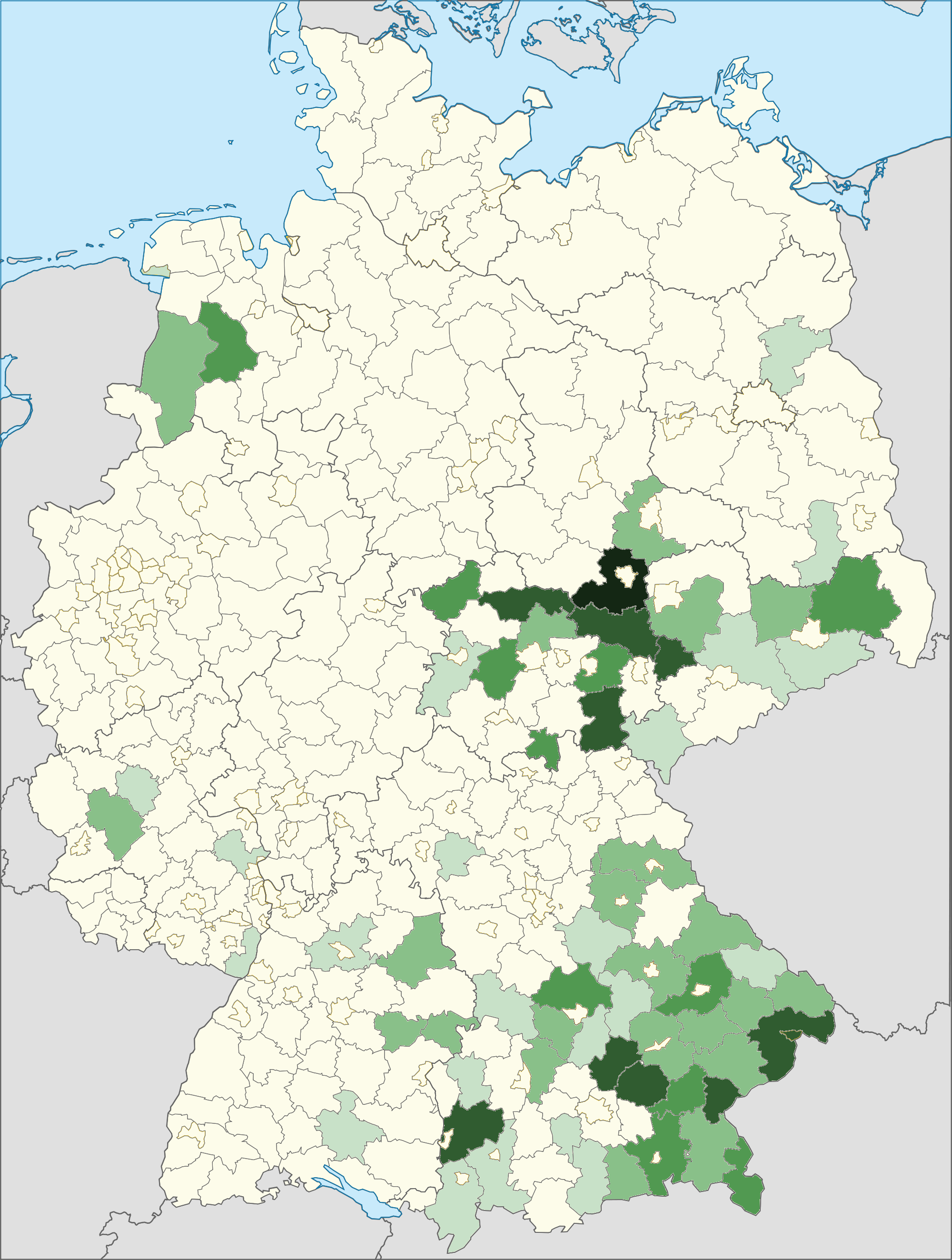 Karte der Personen mit ungarischer Staatsangehörigkeit und deren relativer Häufigkeit in den Landkreisen 2014. Dunkelgrün: häufigste ausländische Staatsangehörigkeit in diesem Kreis, hellgrün: fünfthäufigste ausländische Staatsangehörigkeit in diesem Kreis, weiß: sechsthäufig oder weniger. Quelle: Ausländerzentralregister, Stand 31. Dezember 2014. Saarland: keine Daten auf Kreisebene (dargestellt ist die Landesebene). Deutschlandweite relative Häufigkeit der ausländischen Staatsangehörigkeit Ungarn: Platz 13.